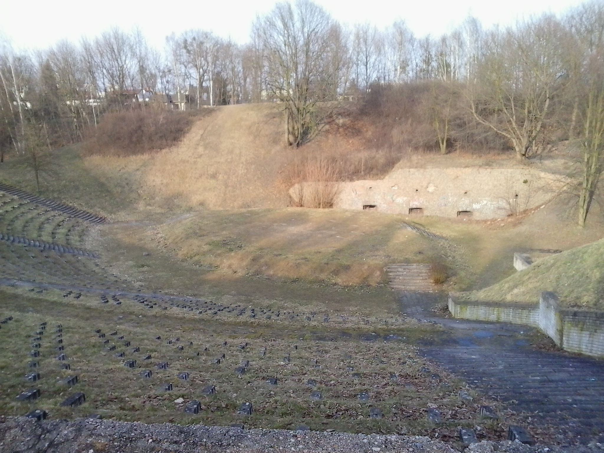 Amfiteatr na Cytadeli w Poznaniu.